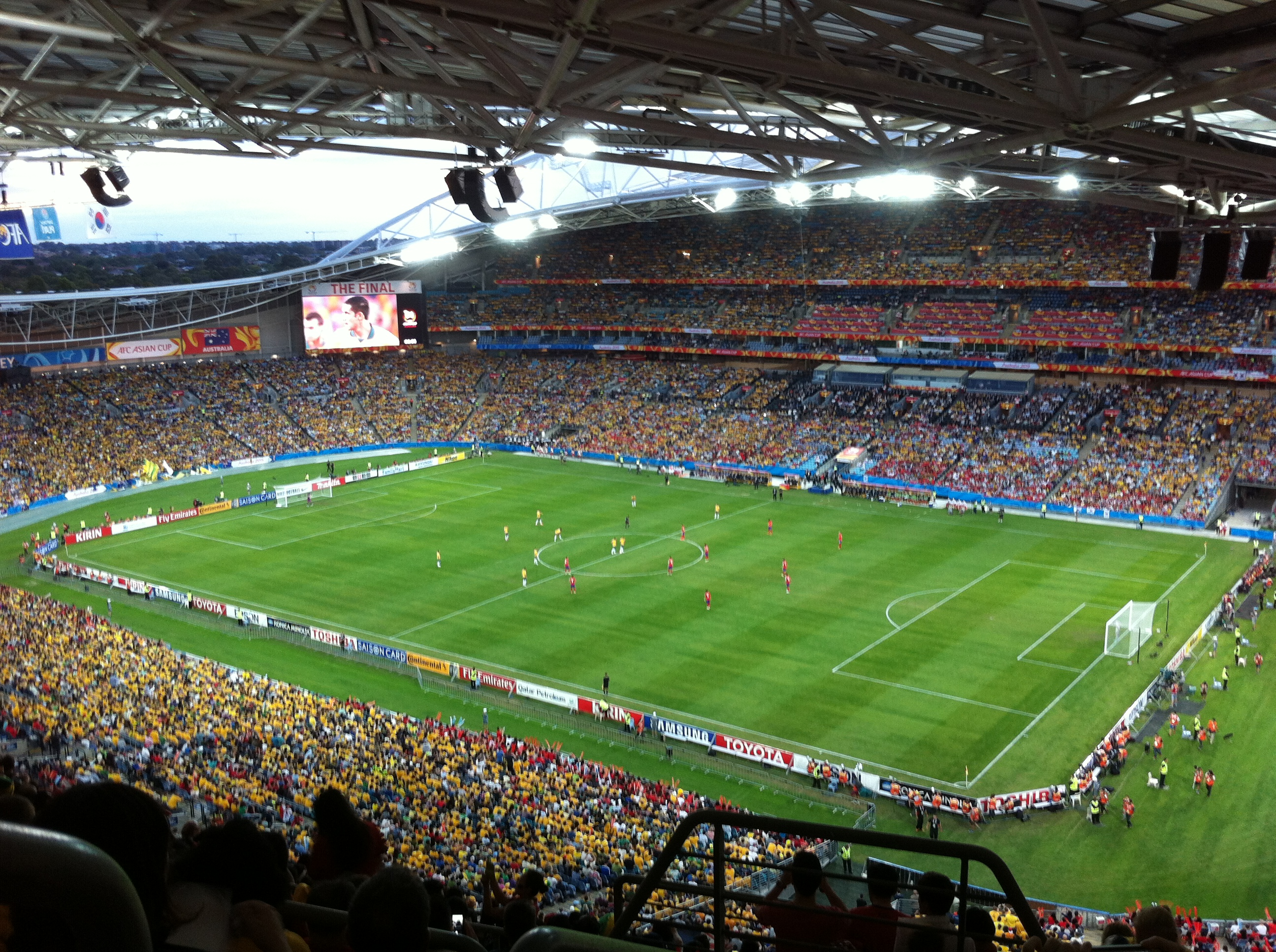 Asian Cup Final